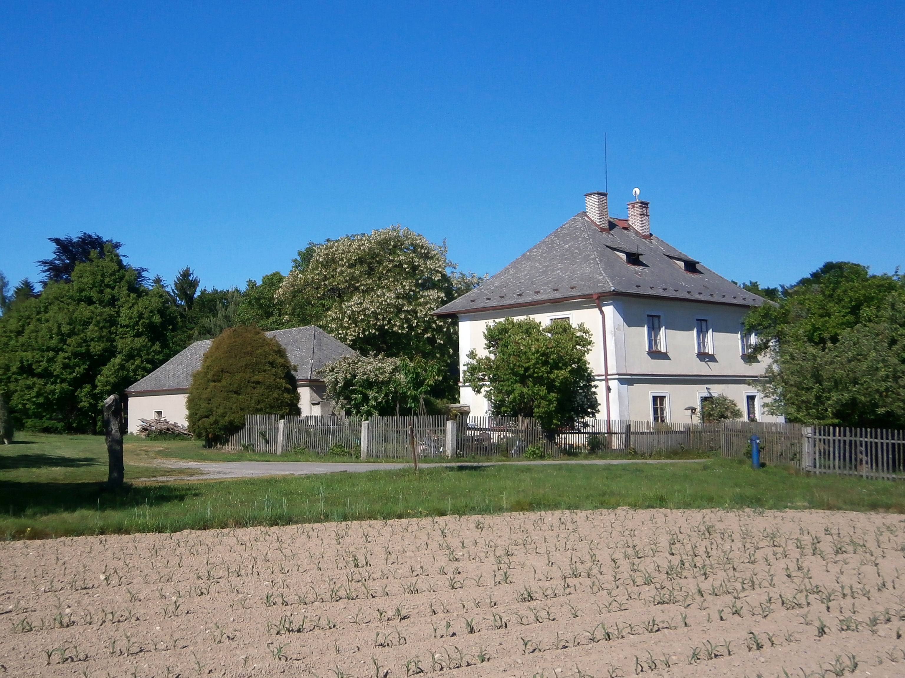 Boušínská fara (Slatina nad Úpou)